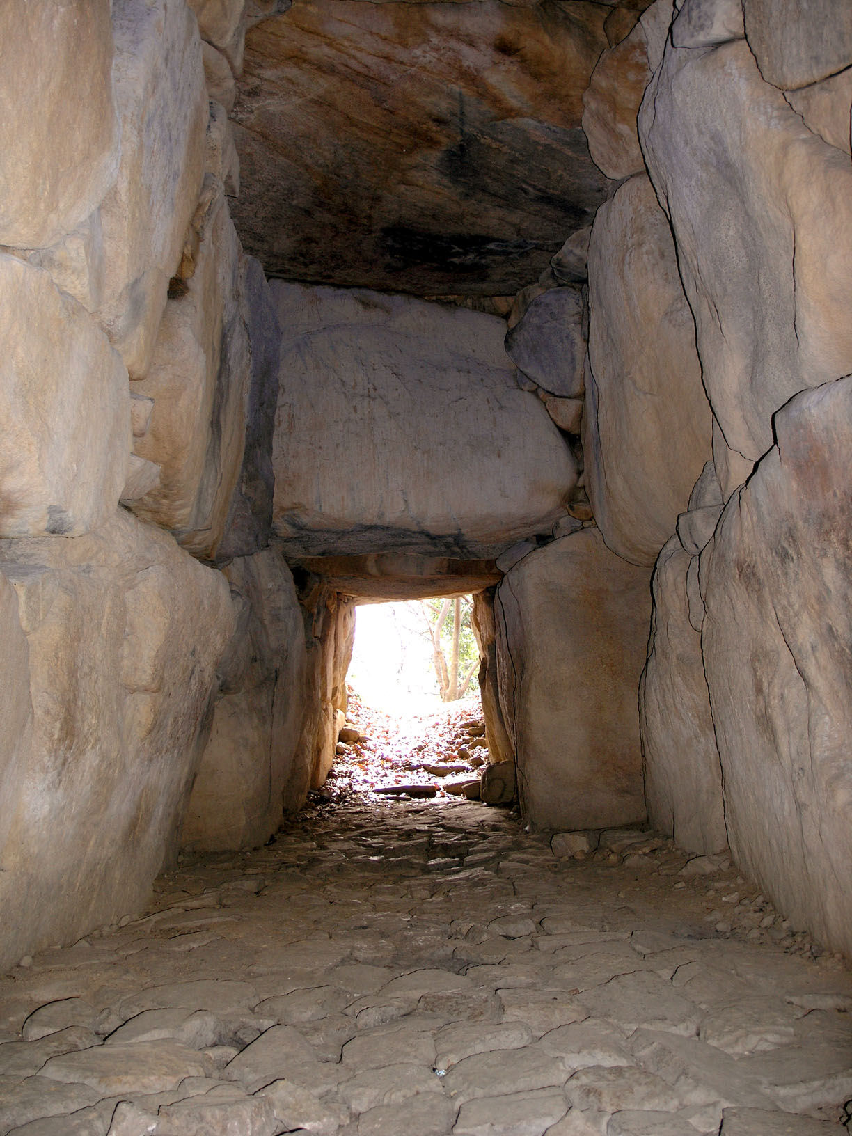 Atagozuka kofun in Yao, Osaka, Japan